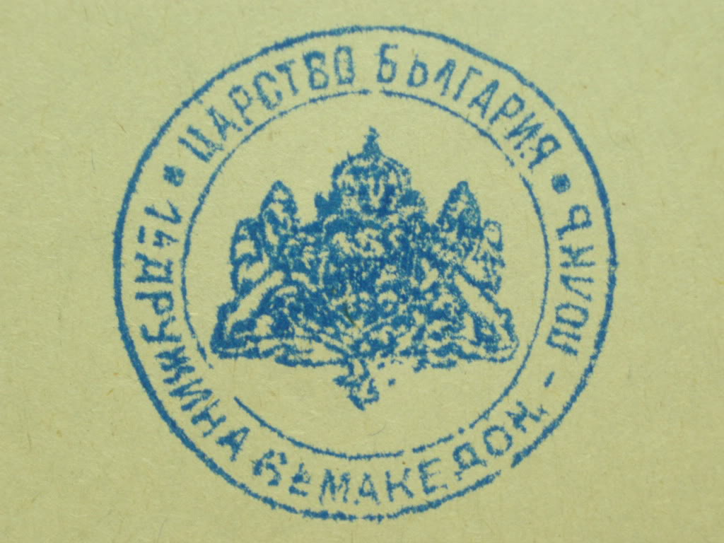 Печат на 1 дружина на 6 пехотен македонски полк.